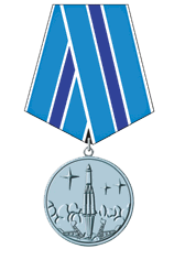 Медаль «За заслуги в освоении космоса» (Российская Федерация)